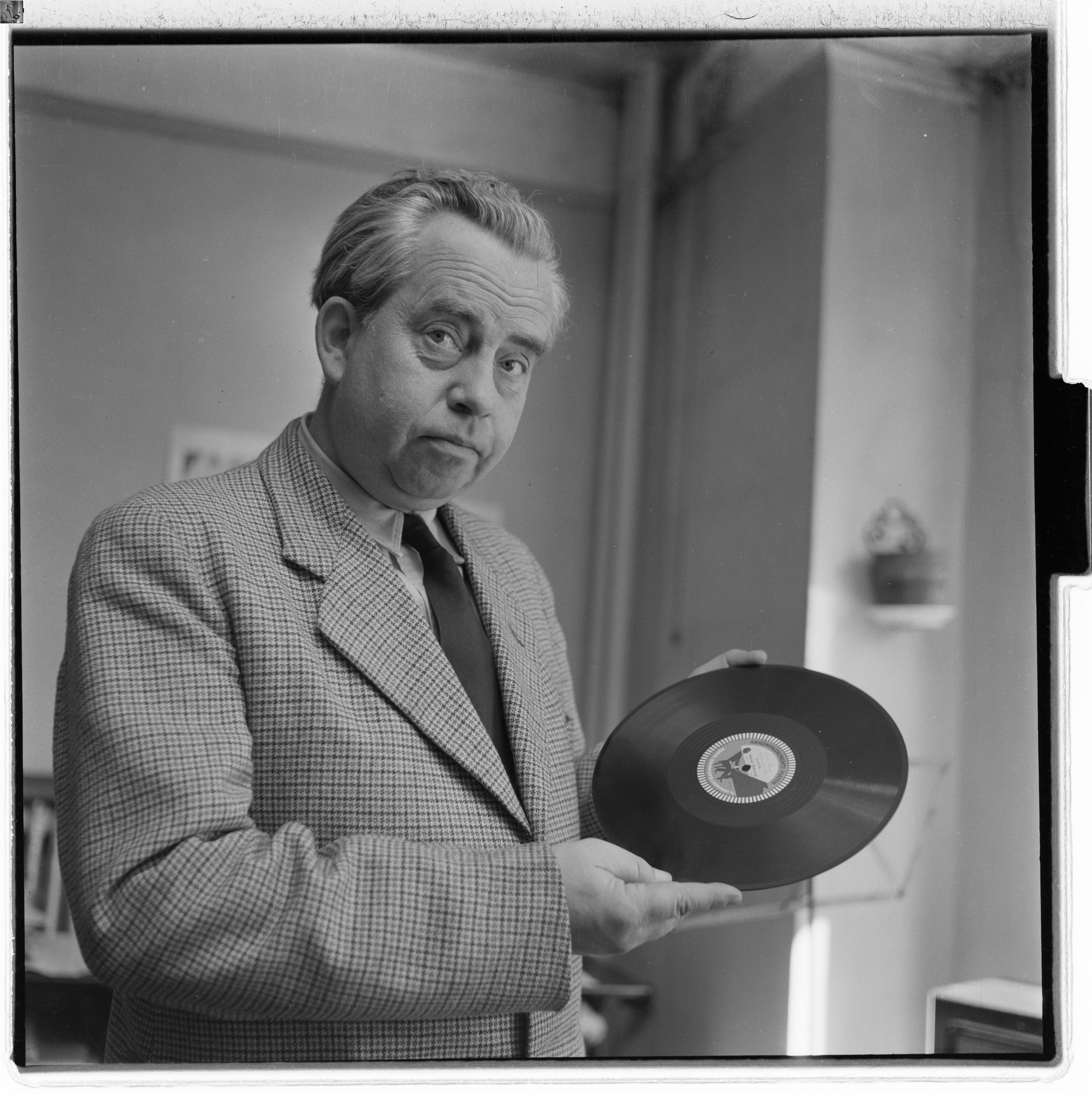 Bildet er hentet fra Arkivverket. Amund Raknerud Arkivinstitusjon : Riksarkivet Arkivnavn : Billedbladet NÅ Sted : Norge, Ukjent, Ukjent, Ukjent Emneord: Menn, Portretter, Musikk Avbildet: Raknerud, Amund